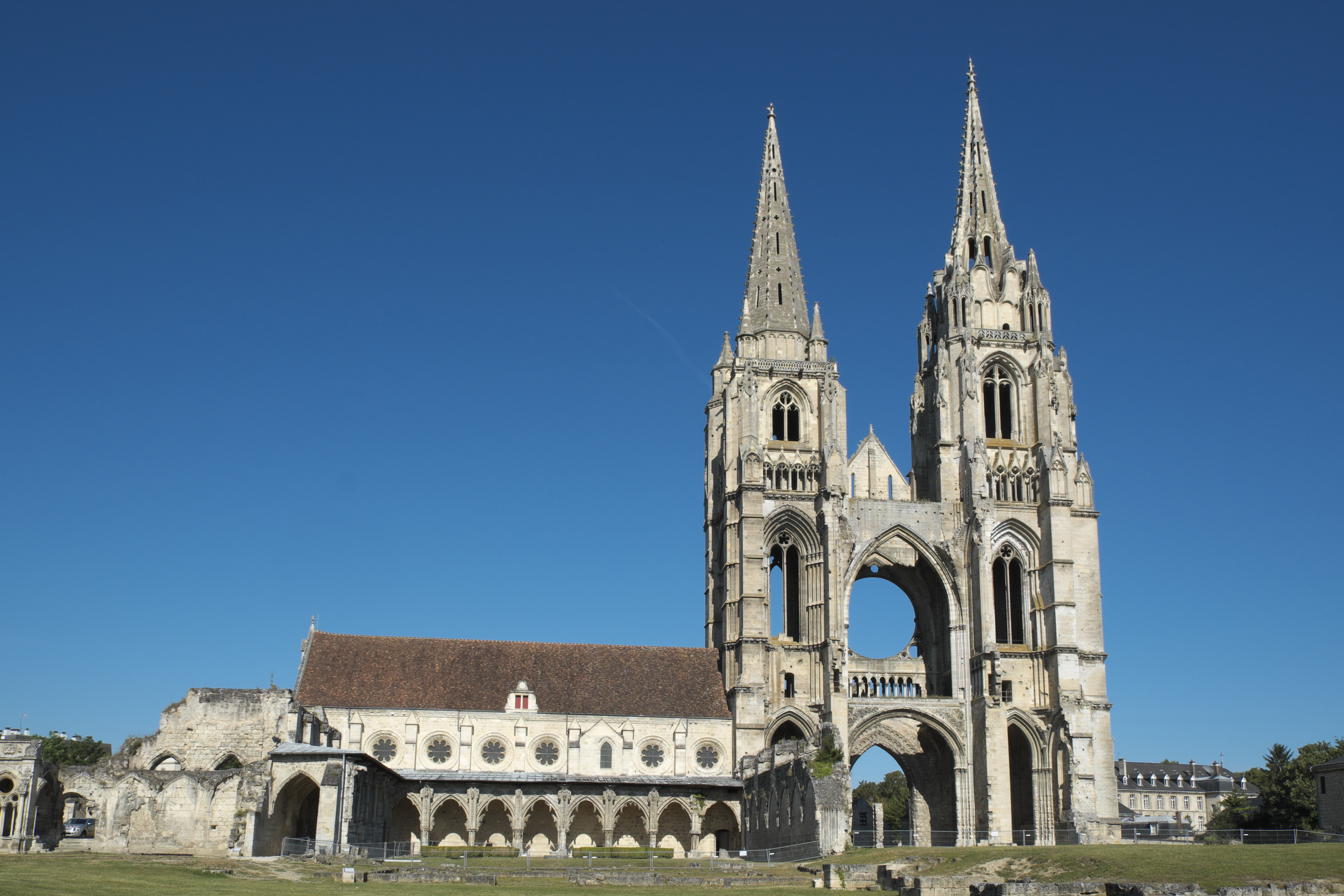 Fassade und Glockentürme der ehemaligen Abteikirche Saint-Jean-des-Vignes in Soissons im Département Aisne (Picardie/Frankreich), links großer Kreuzgang